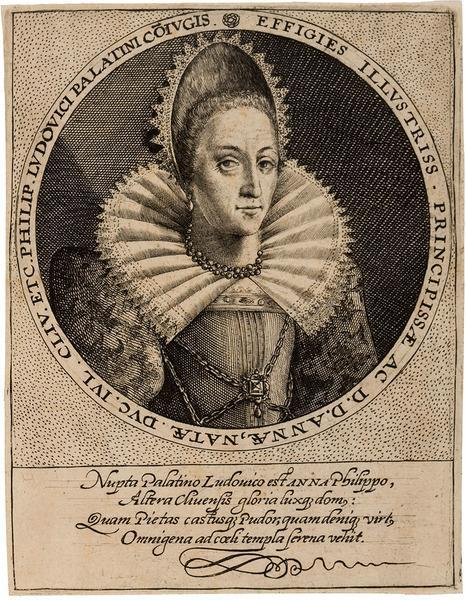 Анна (1552-1632), герцогиня Юлих-Клеве-Бергская, пфальцгерцогиня Нейбургская